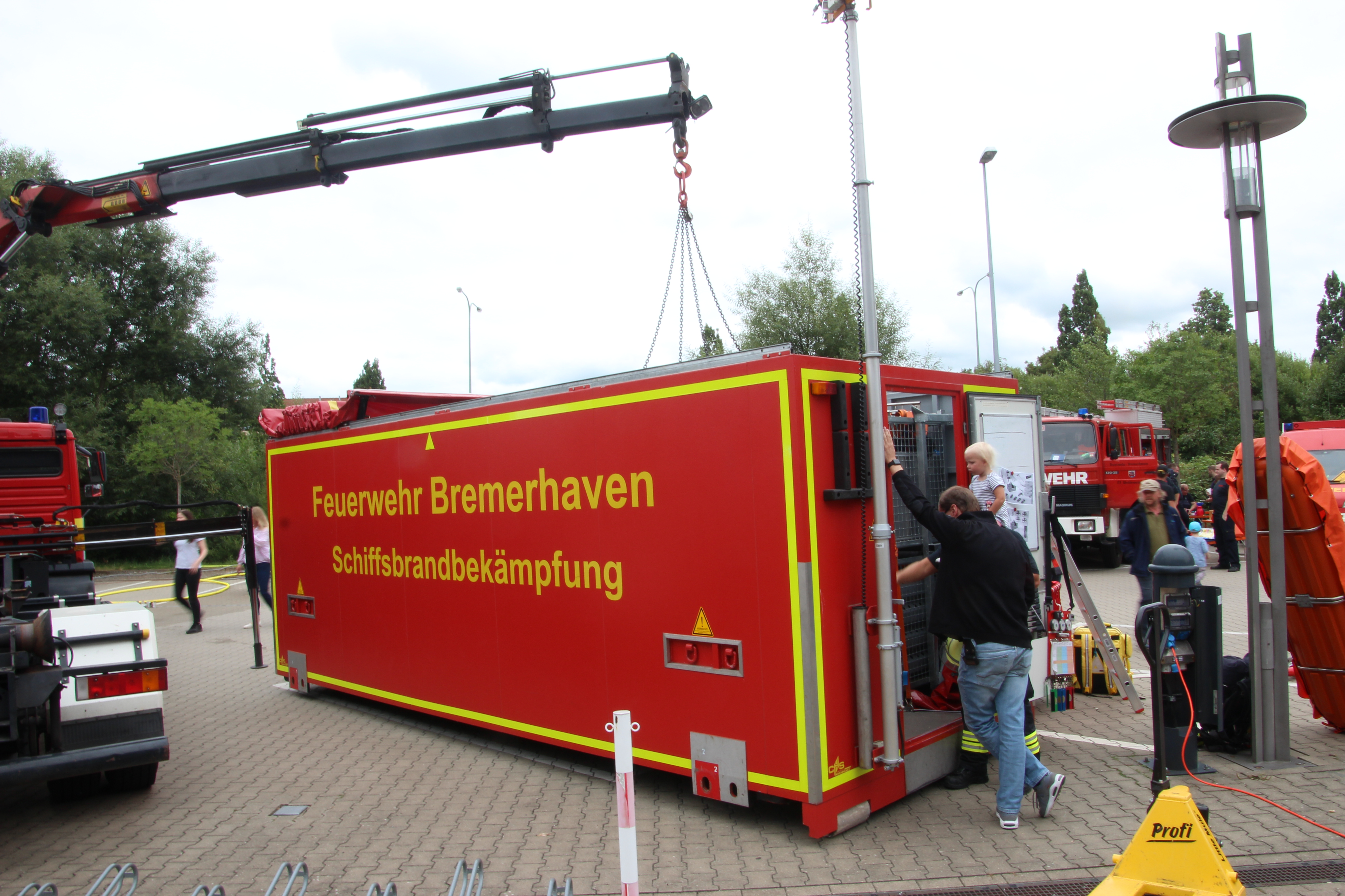 Abrollbehälter AB-Schiffsbrandbekämpfung der Feuerwehr Bremerhaven bei der Jubiläumsfeier zu 125 Jahren Feuerwehr Bremerhaven